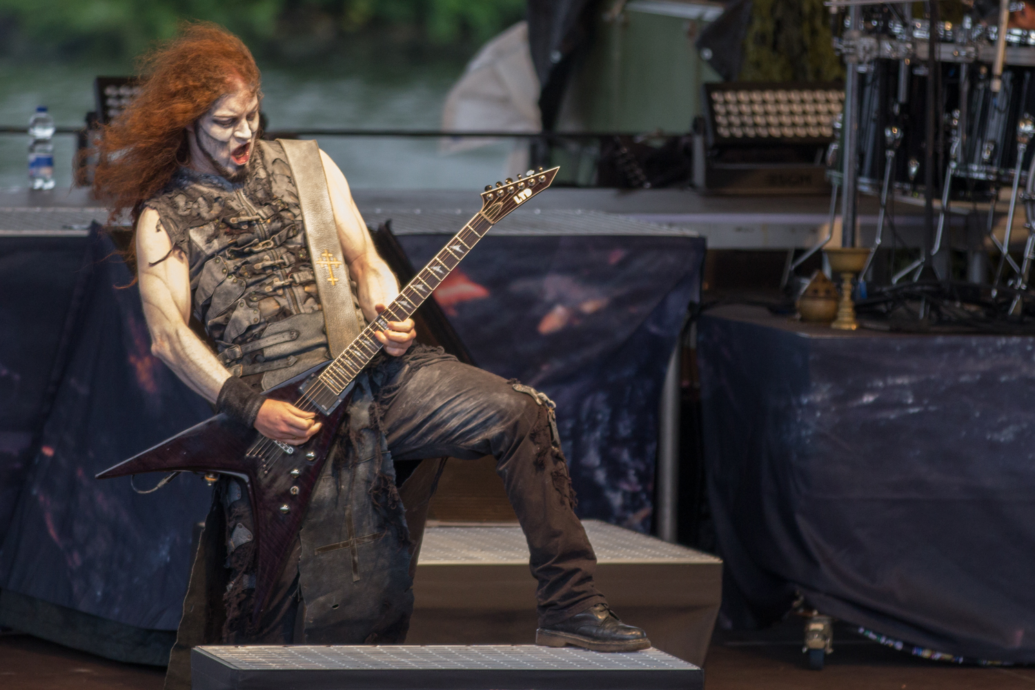 Sabaton Open Air Powerwolf Gitarre